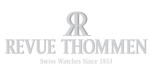 Logo von Revue Thommen AG, Waldenburg, Schweiz